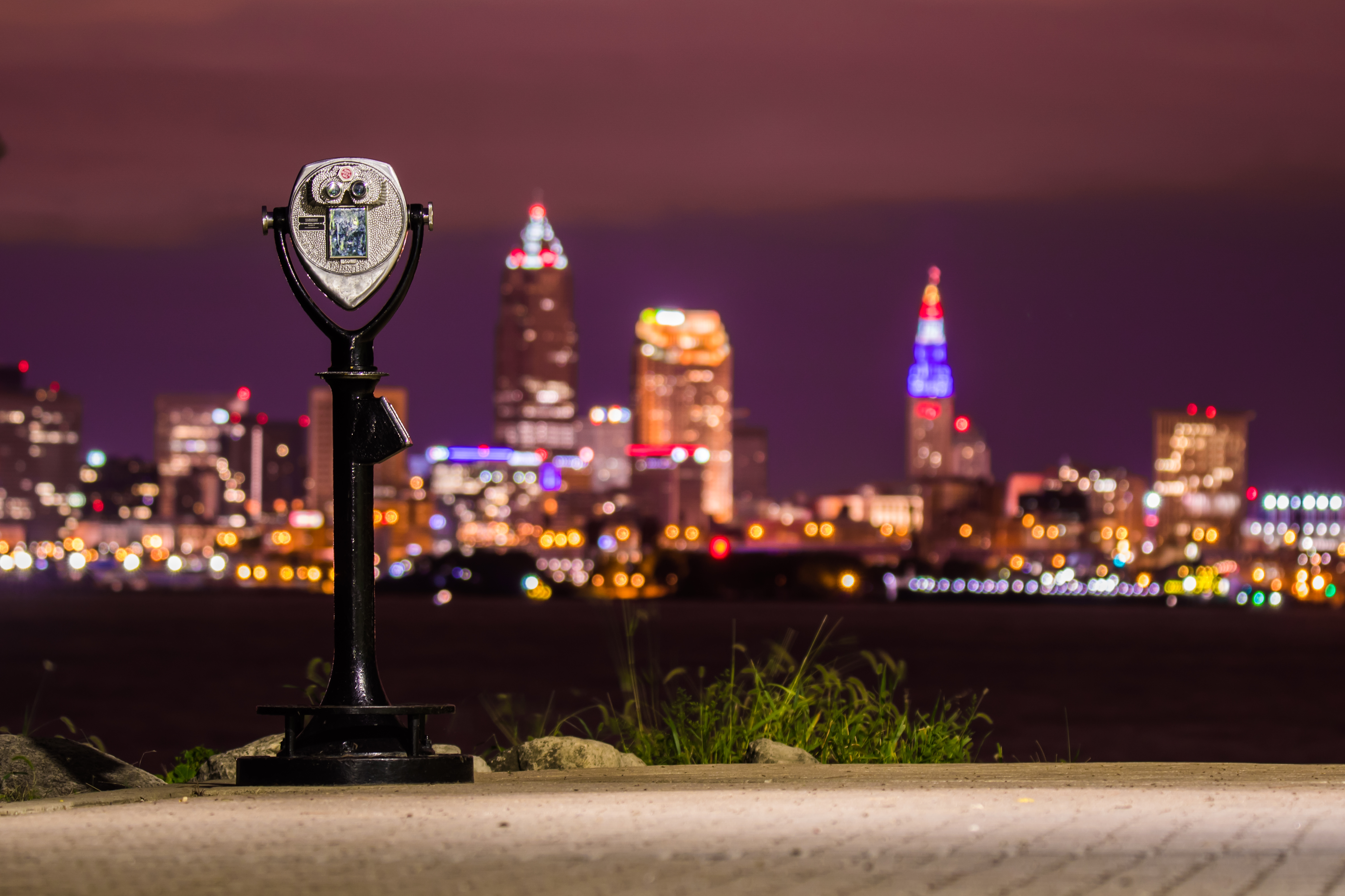 Lakewood Park